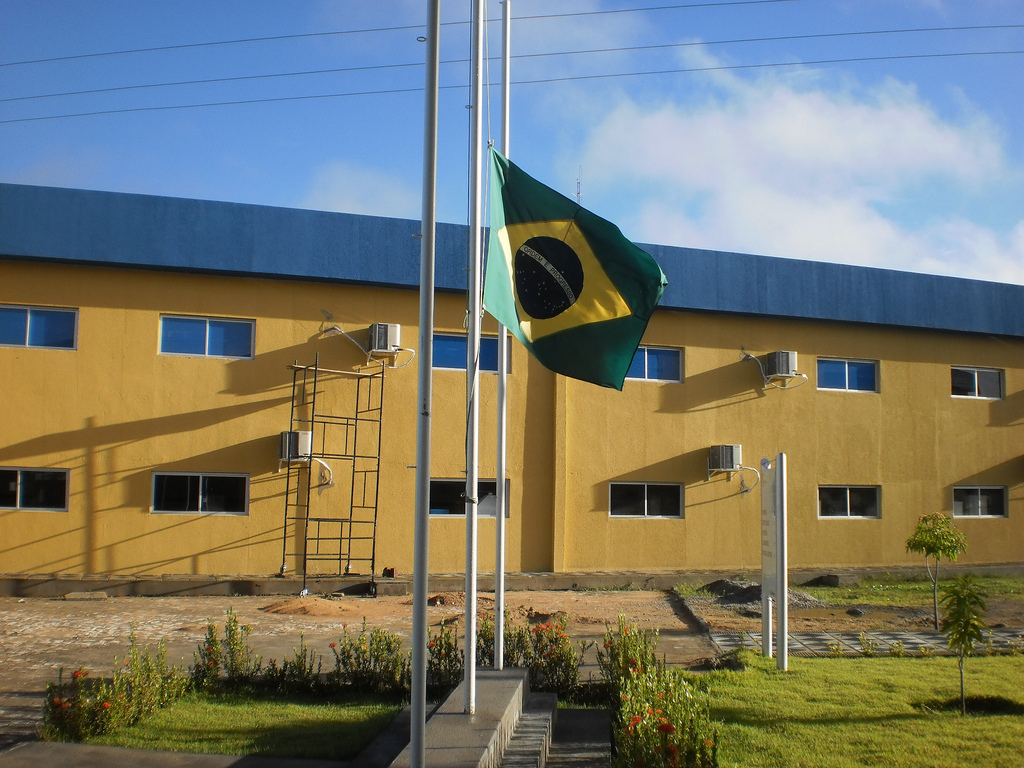 Bandeira do Brasil a meio mastro, no IFRN - Campus Pau dos Ferros, em dia de luto ao Massacre do Realengo, no Rio de Janeiro.